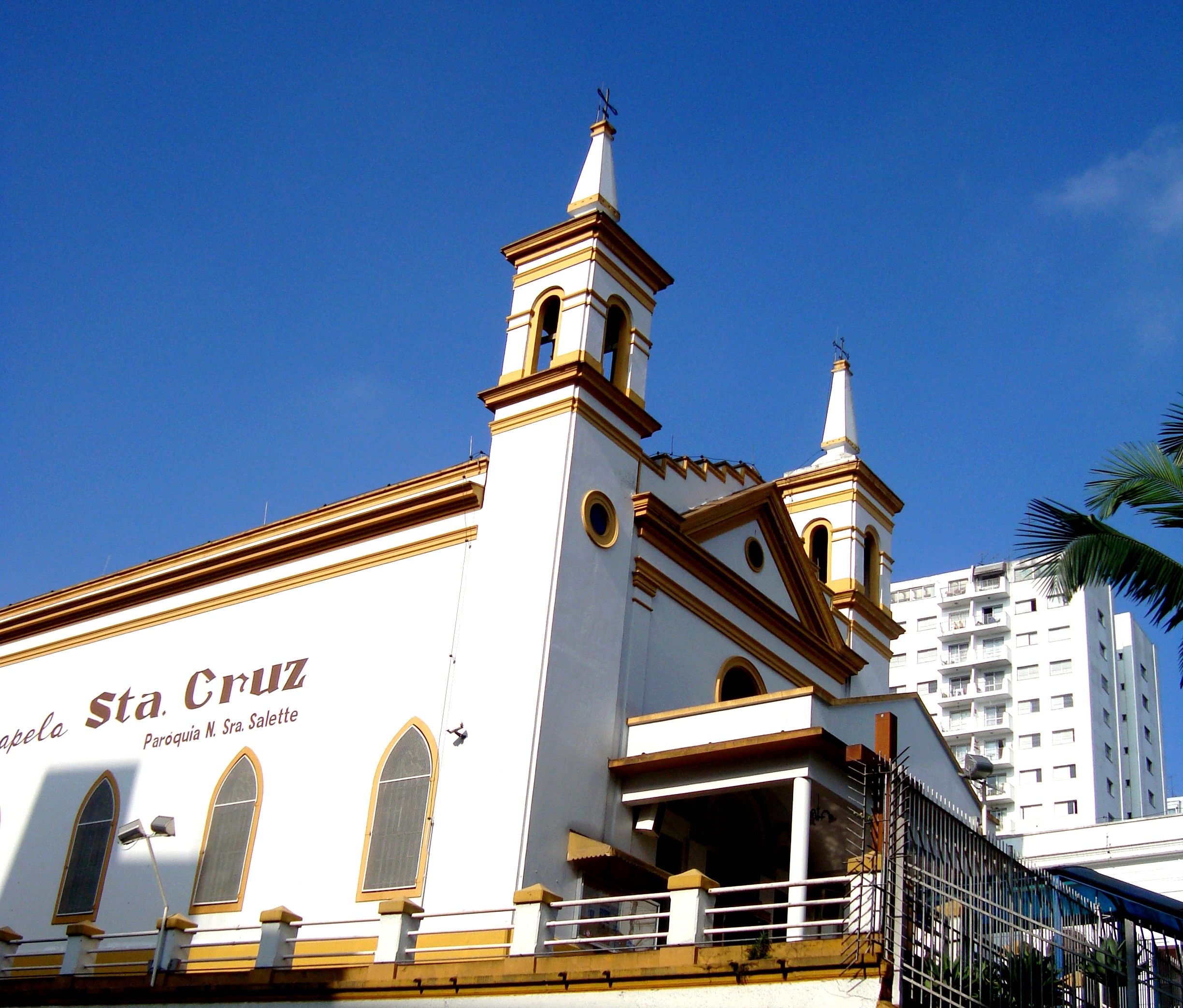 Foto da Capela de Santa Cruz no Alto de Santana, região da cidade de São Paulo.